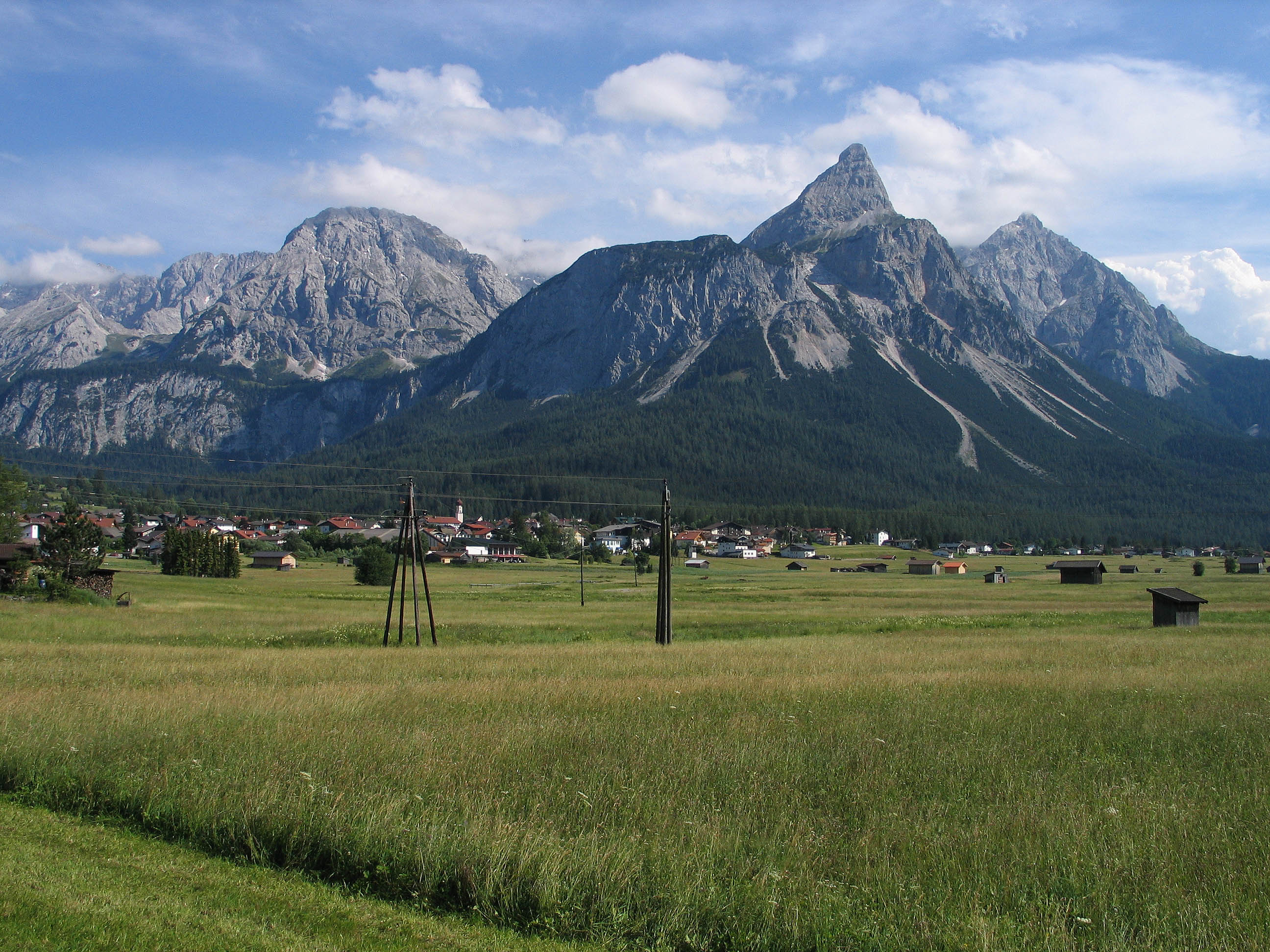 Ehrwalder Sonnenspitze vom Ehrwalder Becken gesehen